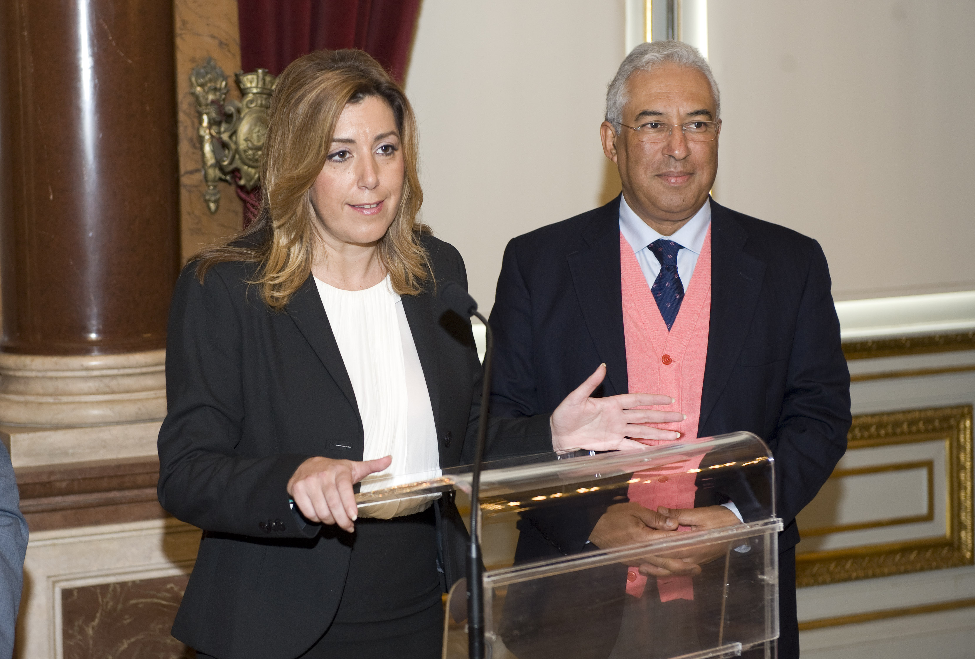 14.11.17 Visita Ayuntamiento de Lisboa 3